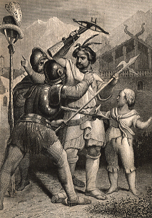 Wilhelm Tell geht mit seinem Sohn am Geßler-Hut vorbei, ohne ihn zu grüßen.